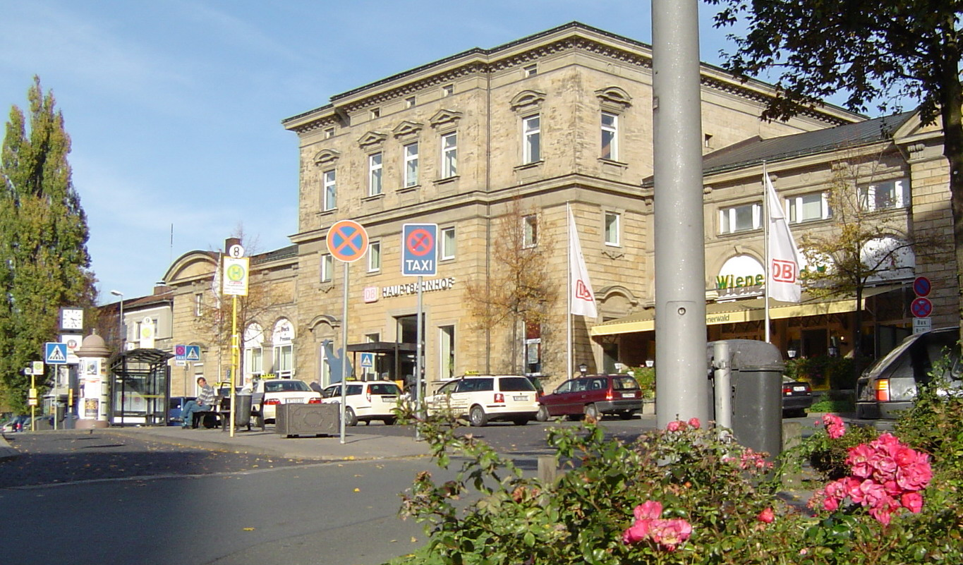 Bayreuth, Bahnhof, Bahnhofstrasse 20, Denkmal Nr. D-4-62-000-7